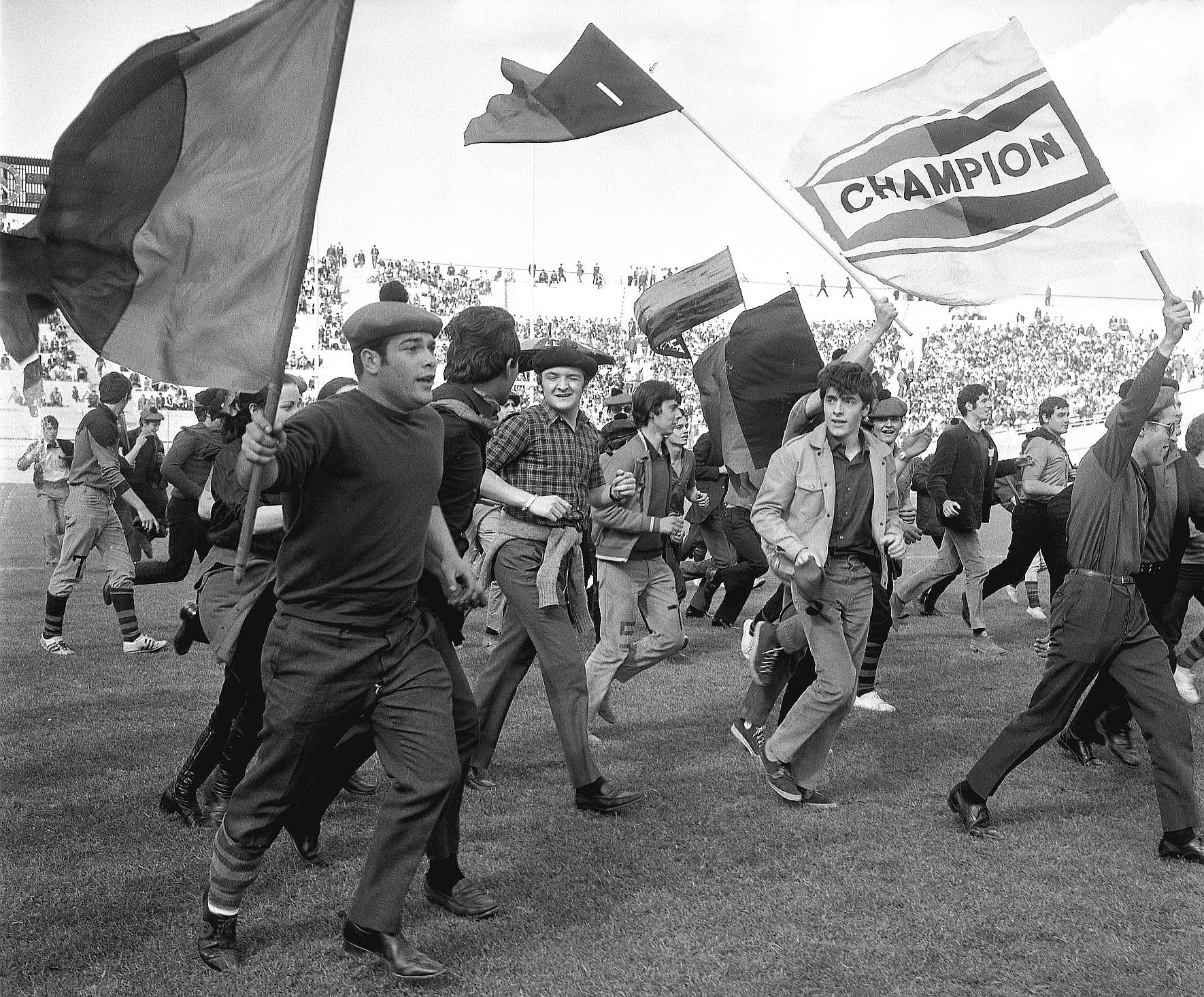 Stade de Gerland. Le 18 Mai 1969. Vue d'un groupe de supporters du Stade Toulousain sur la pelouse de Gerland.